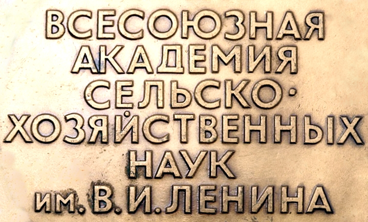 ВАСХНИЛ